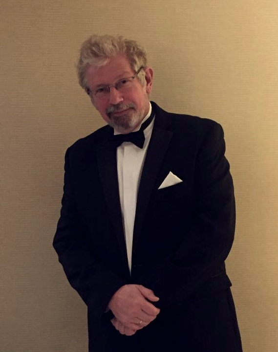 Alexandre Bouzdine, à Cambridge en mars 2019